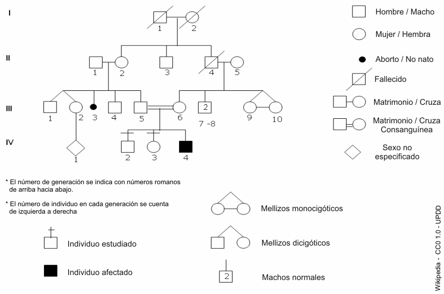 Ejemplo de diagrama de pedigrí con sus símbolos asociados